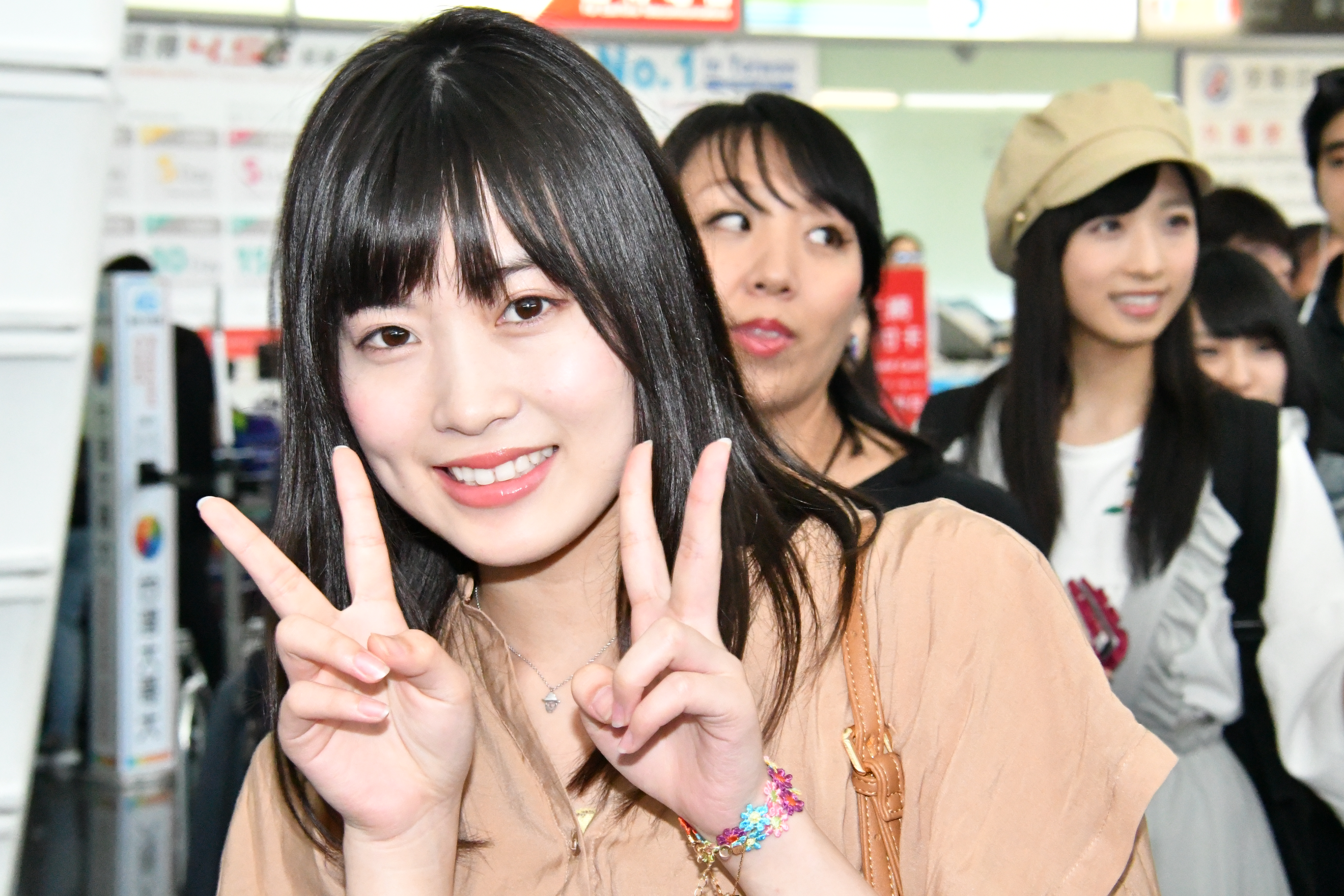 2017.04.30 AKB48 Team8 Fansmeeting in Taiwan 桃園縣機場 抵台